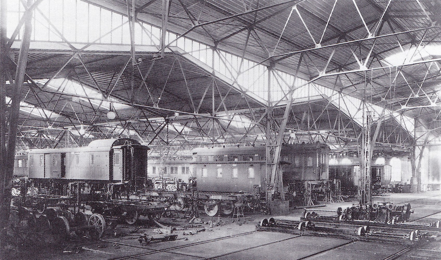 Wagenwerkstätte III von 1893 mit 57 Fahrzeugständen in der Centralwerkstätte München